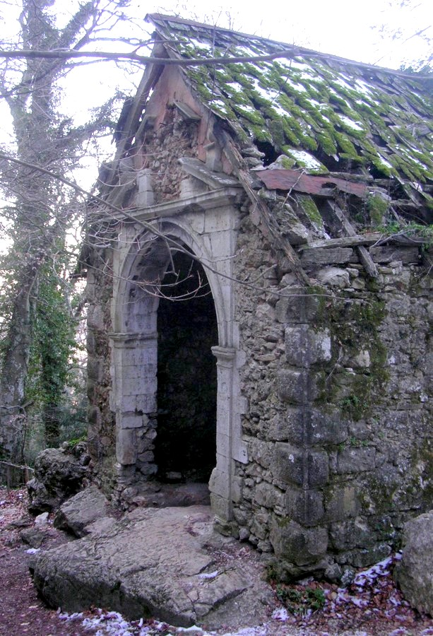 Chapelle des parisien en janvier 2007 - La Sainte Baume - Plan d'Aups - Var - France